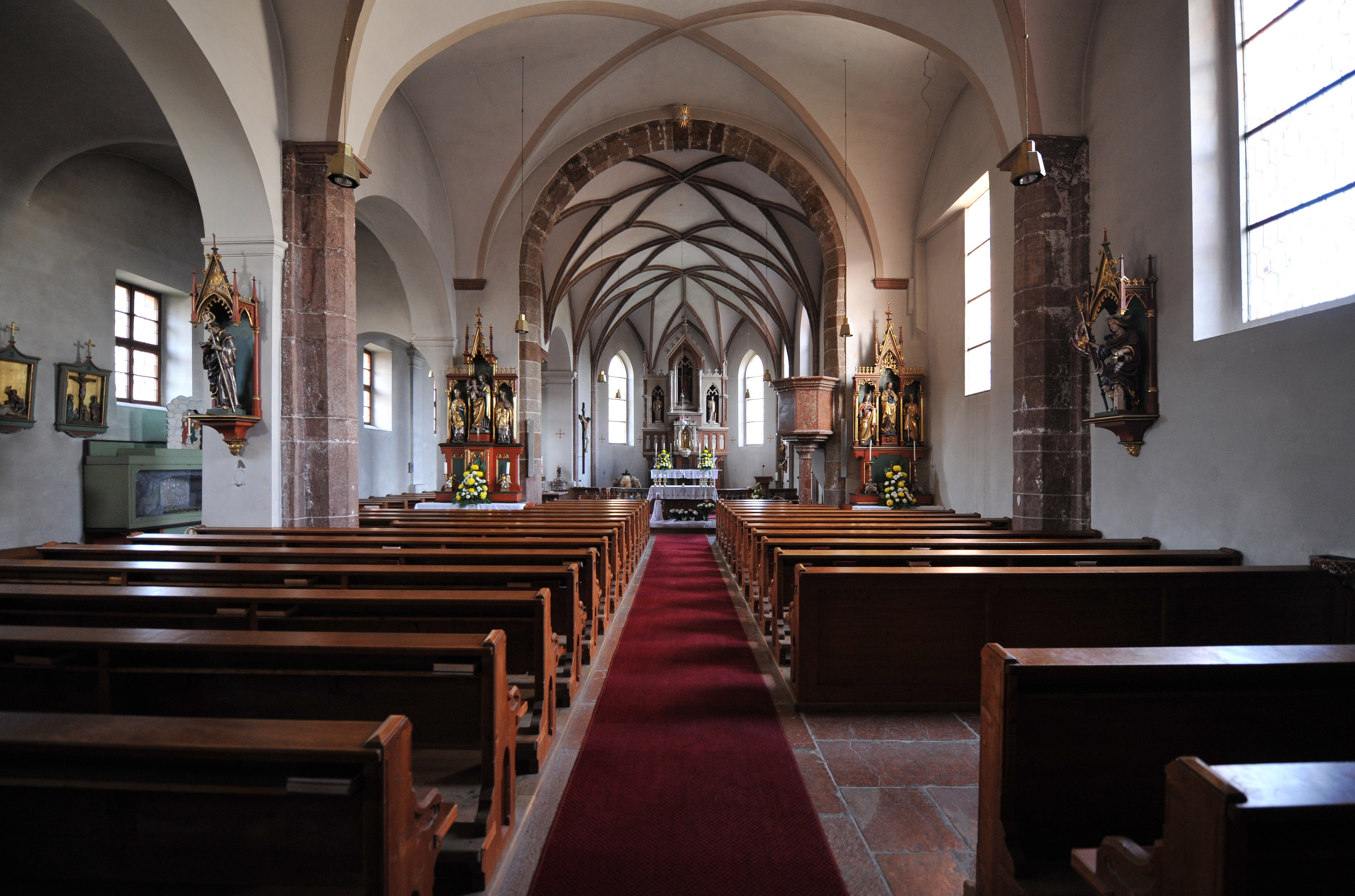 Kath. Pfarrkirche hl. Stephanus und Laurentius